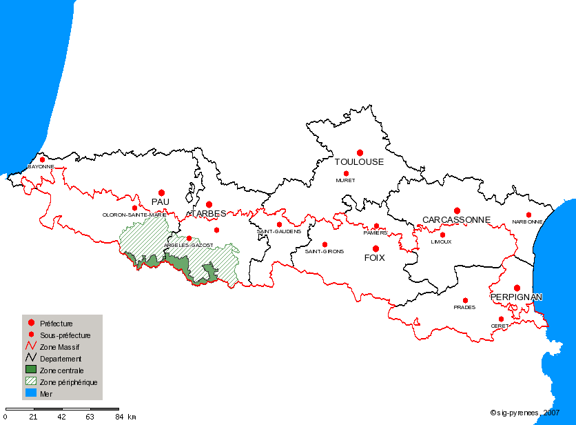 Carte des limites du Parc National des Pyrénées